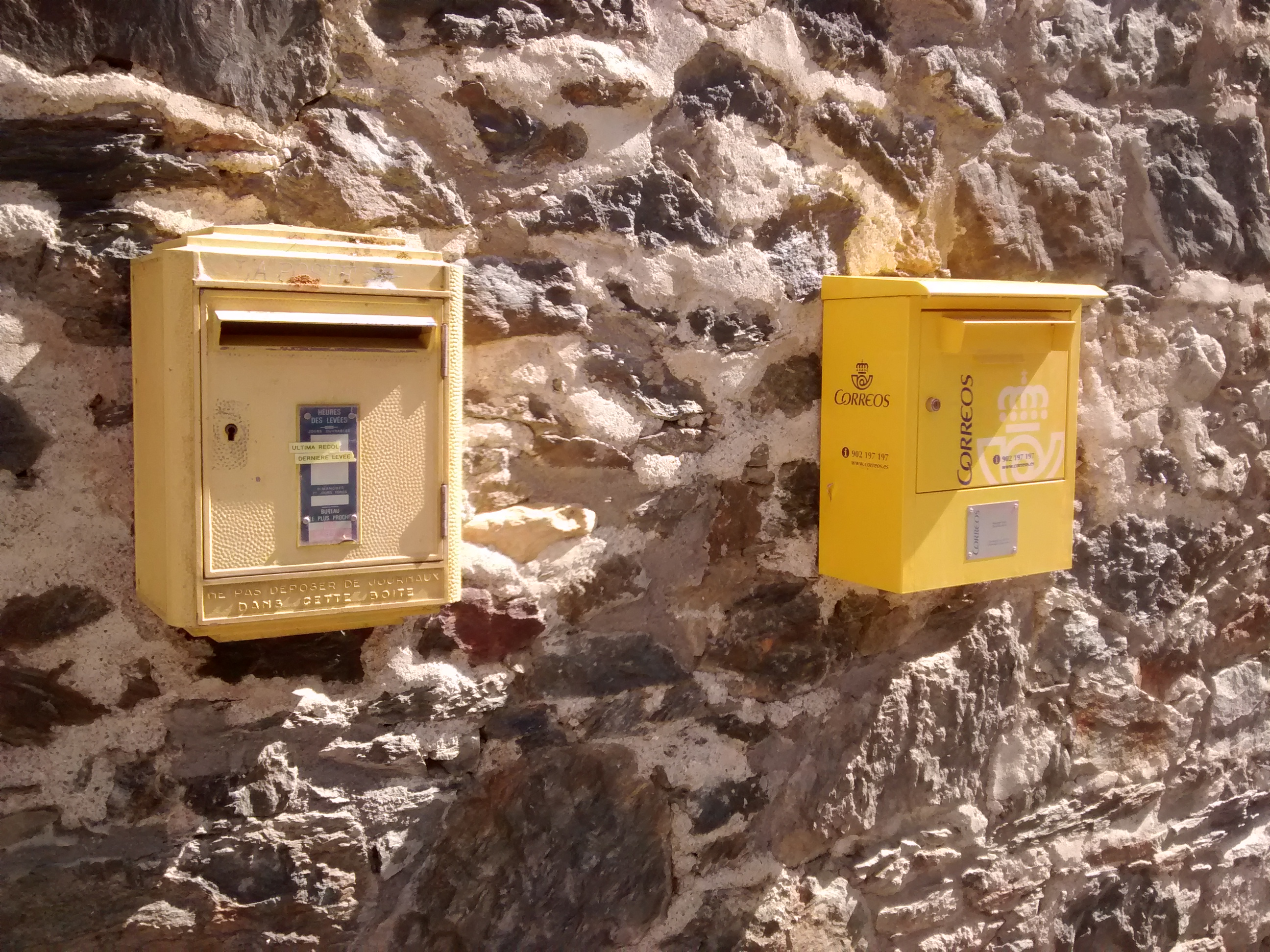 Two post boxes in L'Aldosa de la Massana, Andorra.